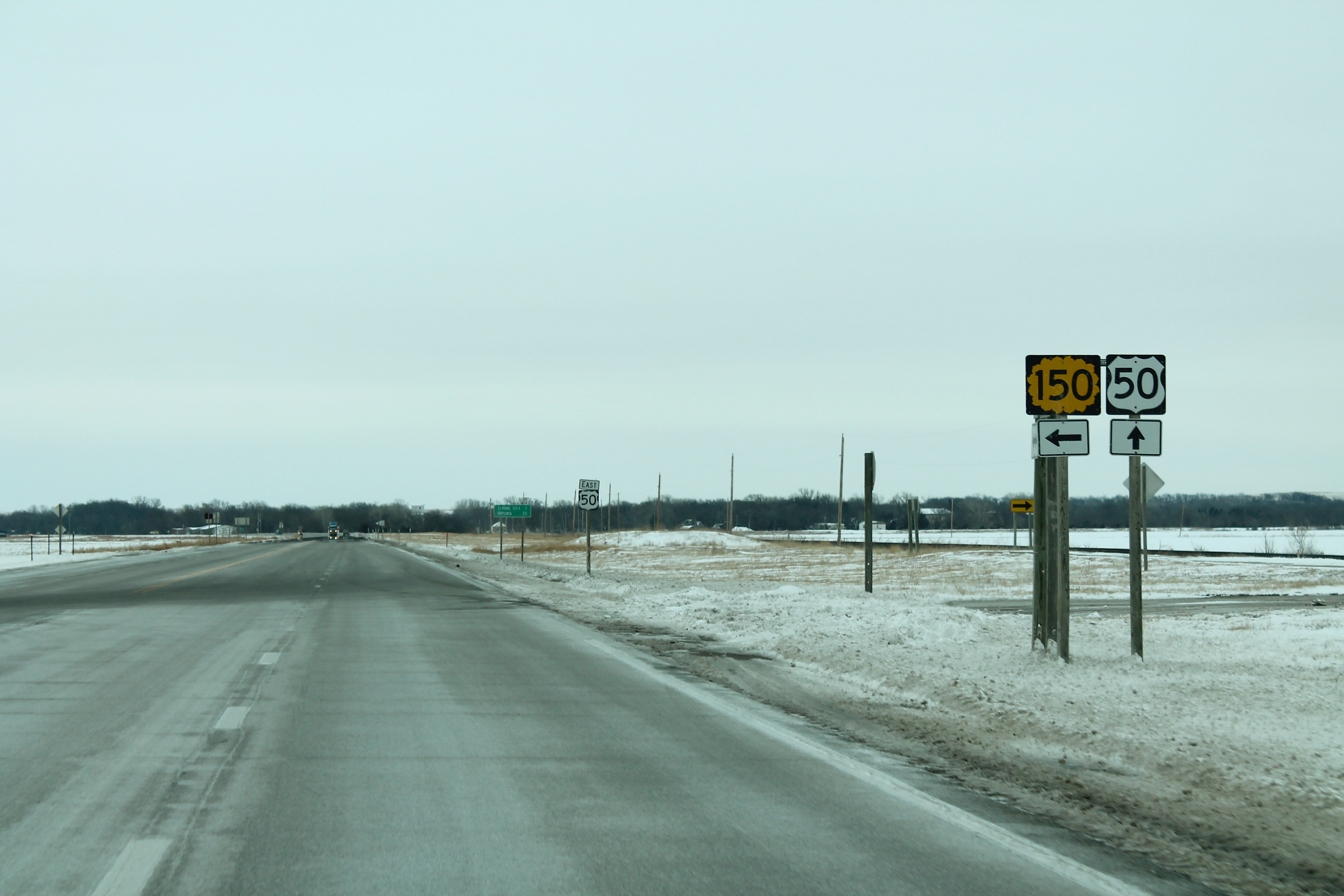 US50eRoad-KS150signs